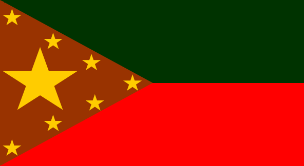 Bandera del municipio Acevedo, estado Miranda, Venezuela